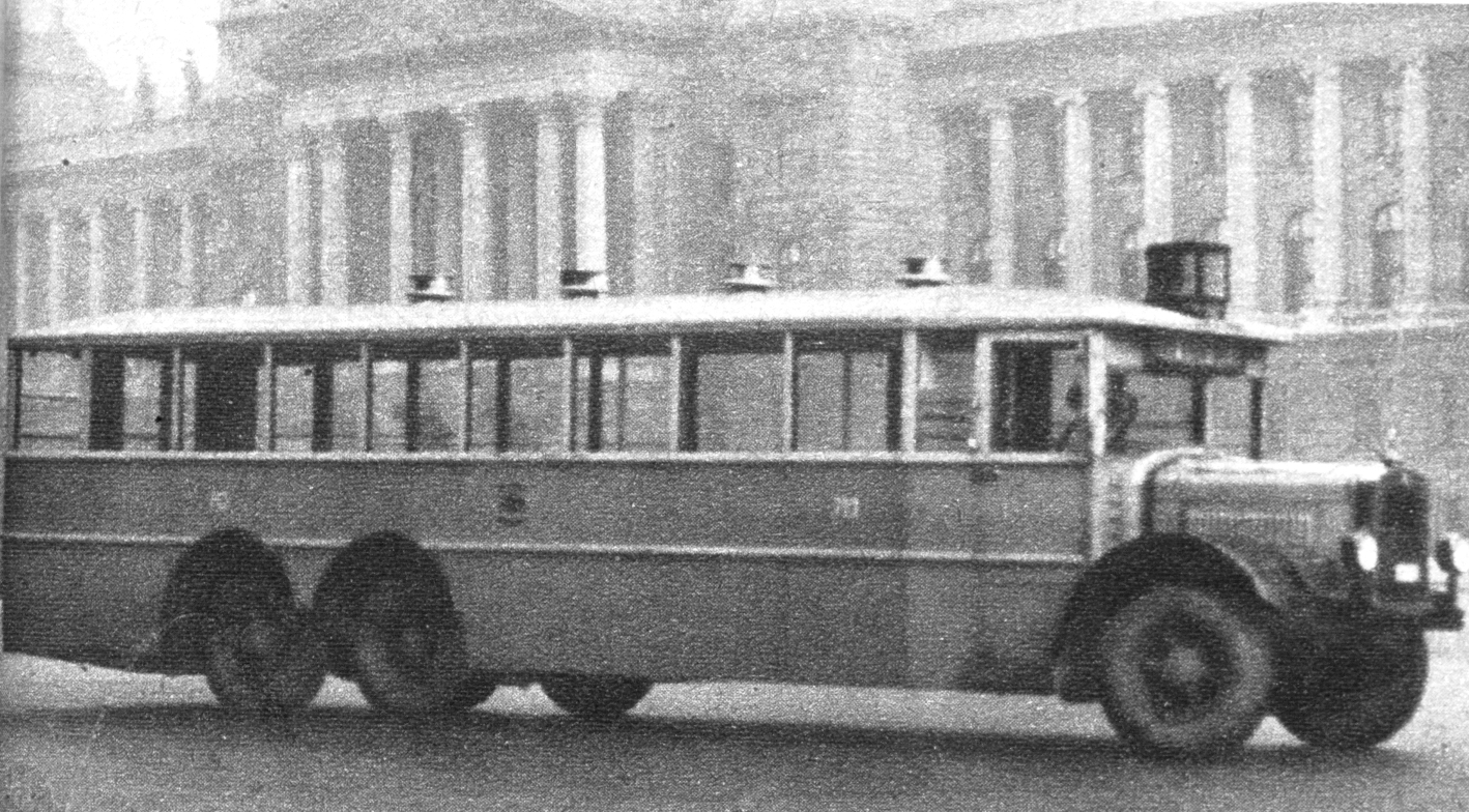 3 tengelyes MÁVAG autóbusz